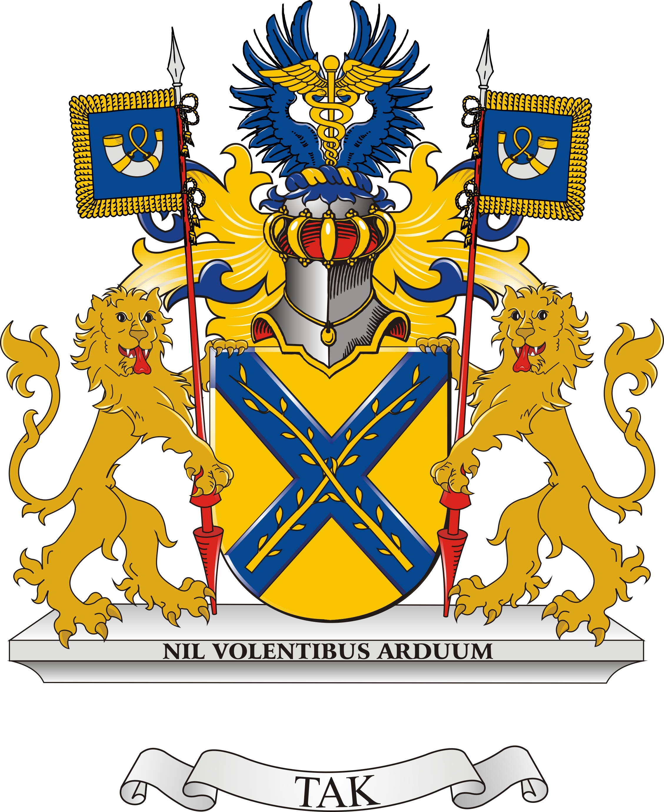 Wapen: in goud een blauw schuinkruis beladen met twee schuingekruiste gebladerde gouden takken. Helmteken: een gouden Mercuriusstaf gaande voor een blauwe vlucht. Dekkleden: blauw, gevoerd van goud. Schildhouders: twee aanziende leeuwen, van natuurlijke kleur, rood getongd, een rode lans met zilveren punt in de voorste klauw houdend, waaraan een blauwe banier met gouden randversiering, beladen met een zilveren jachthoorn, goud beslagen, geopend en gemond. Plaatsing: het geheel geplaatst op een gemarmerd voetstuk. Spreuk: NIL VOLENTIBUS ARDUUM Dit wapen is in 2015 ontworpen door de aanvrager in samenwerking met H.K. Nagtegaal. Geregistreerd op verzoek van Nico Tak, geb. Amstelveen 26 maart 1969, wonend te Bussum, zoon van Cornelis Tak en Anna Veronica Maria Vogelzang, voor de aanvrager en zijn naamdragende nakomelingen. Geregistreerd Handelsmerk. Registered Trademark.